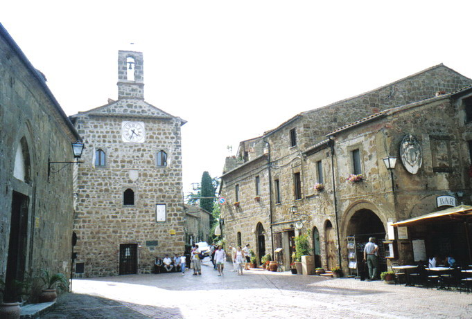 Centro storico di Sovana